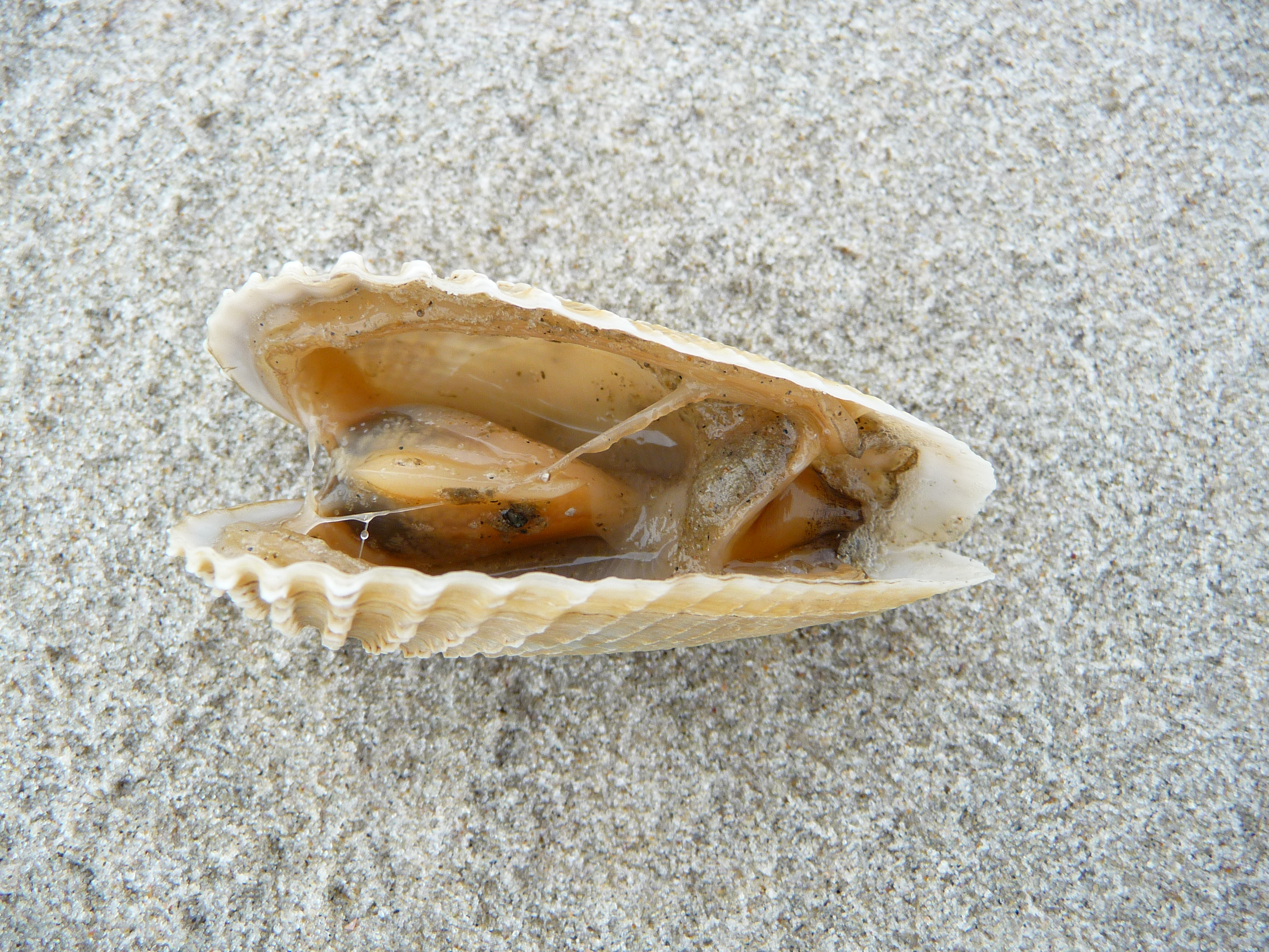 Innere einer Amerikanischen Bohrmuschel (Petricola pholadiformis), fotografiert im Spülsaum der ostfriesischen Nordseeinsel Juist (Niedersachsen, Deutschland)